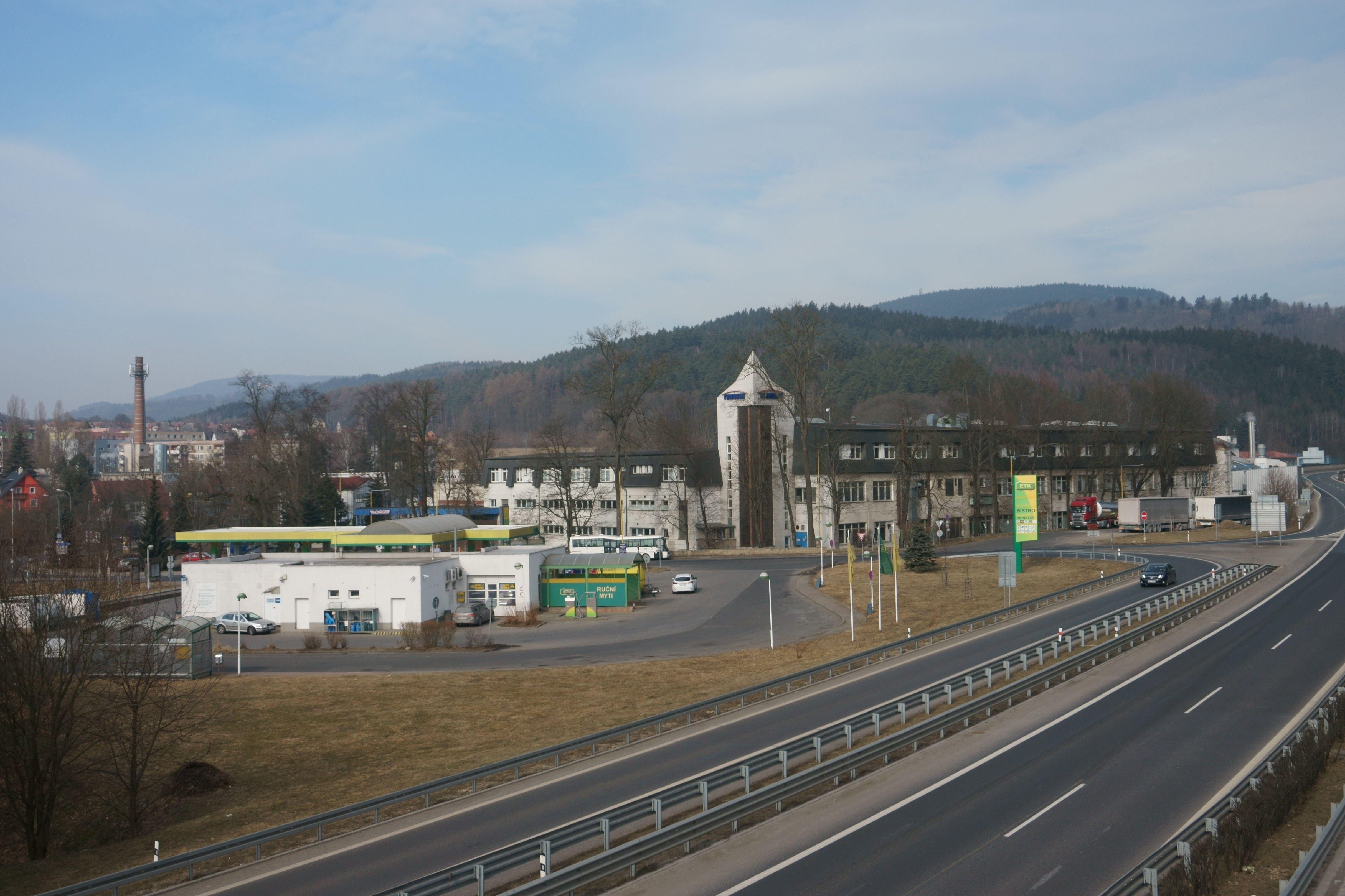 Hodkovice nad Mohelkou - autobusové nádraží a Tenneco